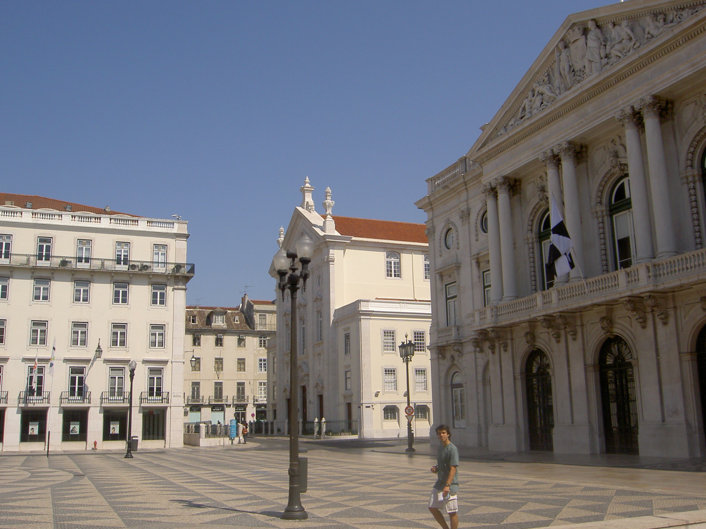 Praça_Municipal in Lisbon